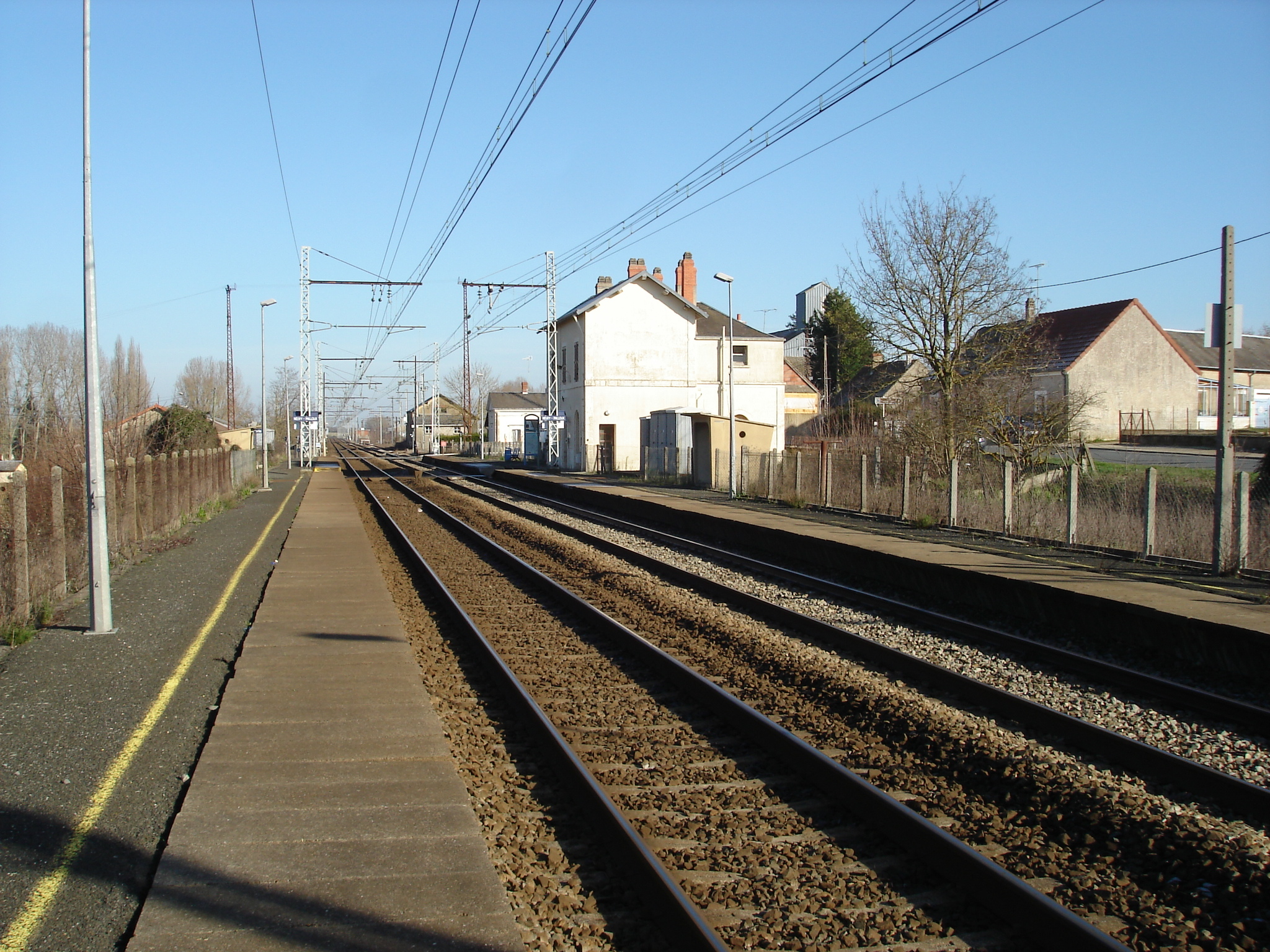 Gare de Neuvy-Pailloux (36) : Vue en direction de Vierzon, des quais et voies.